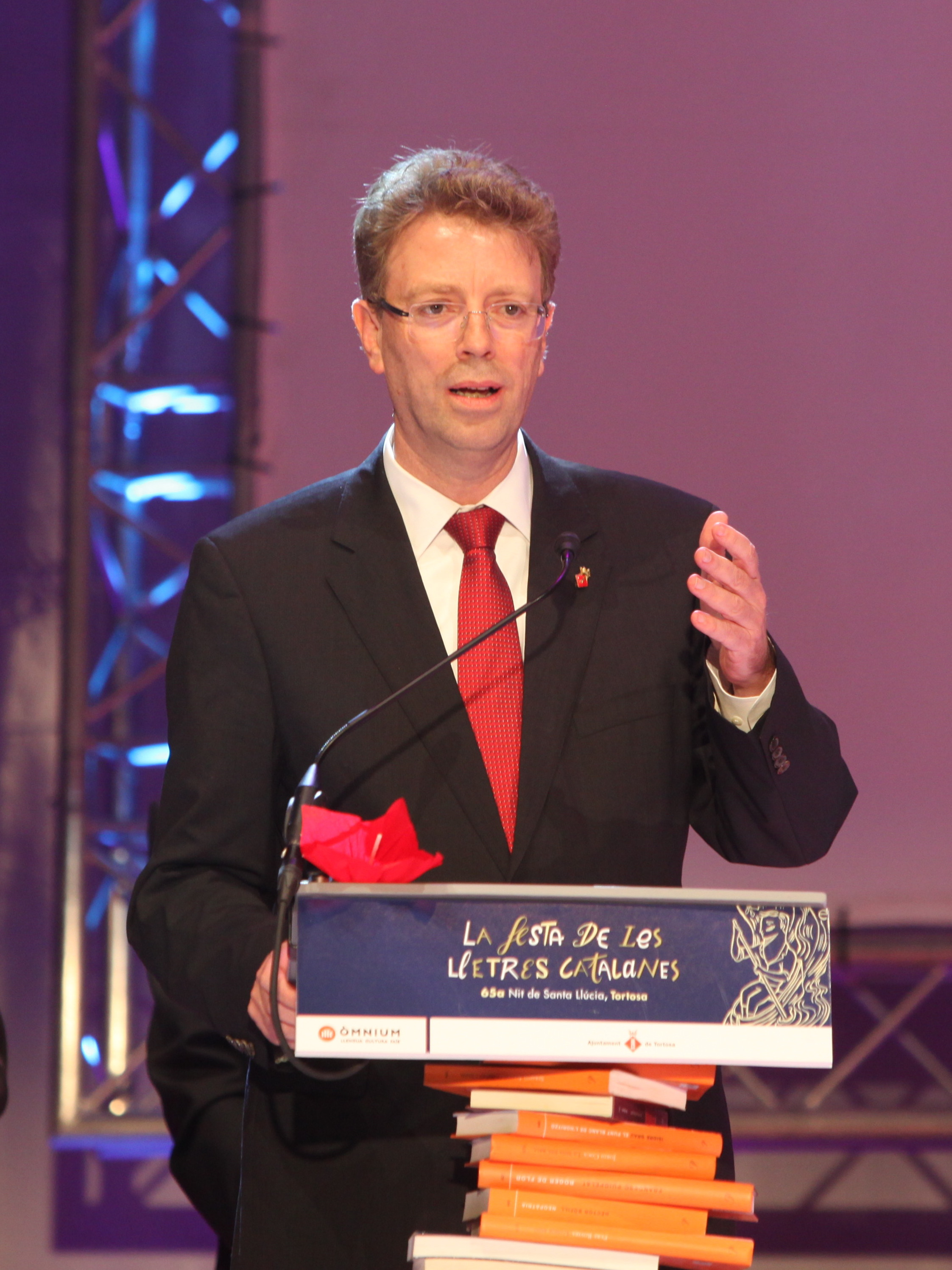 65a Nit_Ferran Bel alcalde_Foto O¦Çmnium Ramon Boadella.jpg 65a Nit de Santa Llúcia Tortosa ha acollit la nit de les #lletrescat de l'any 2015.